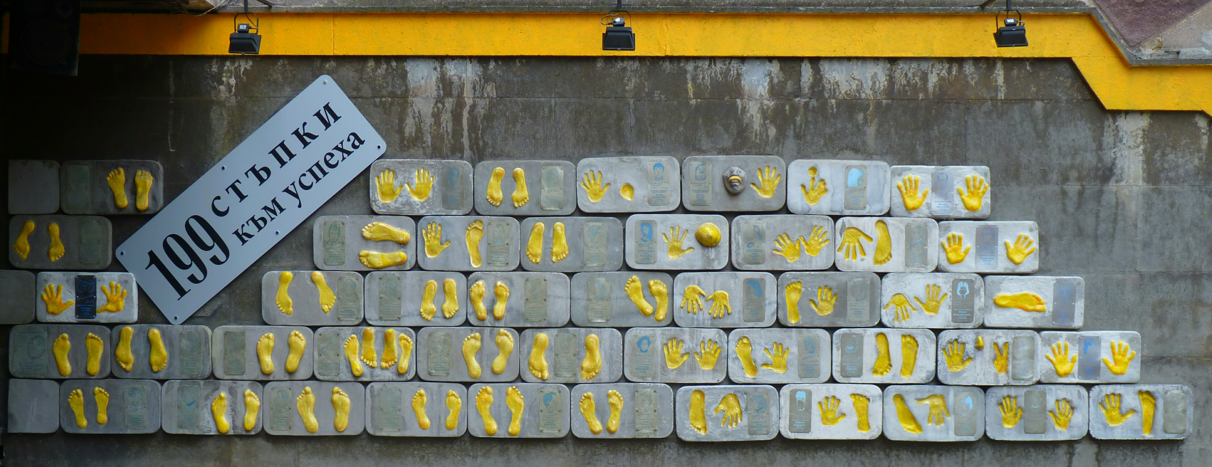 Стената на славата "199 стъпки към успеха" пред Театър 199